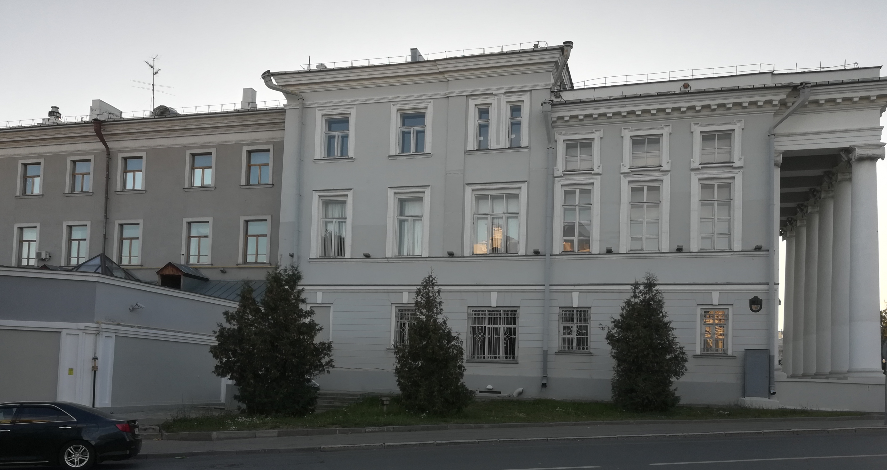 Казанский университет